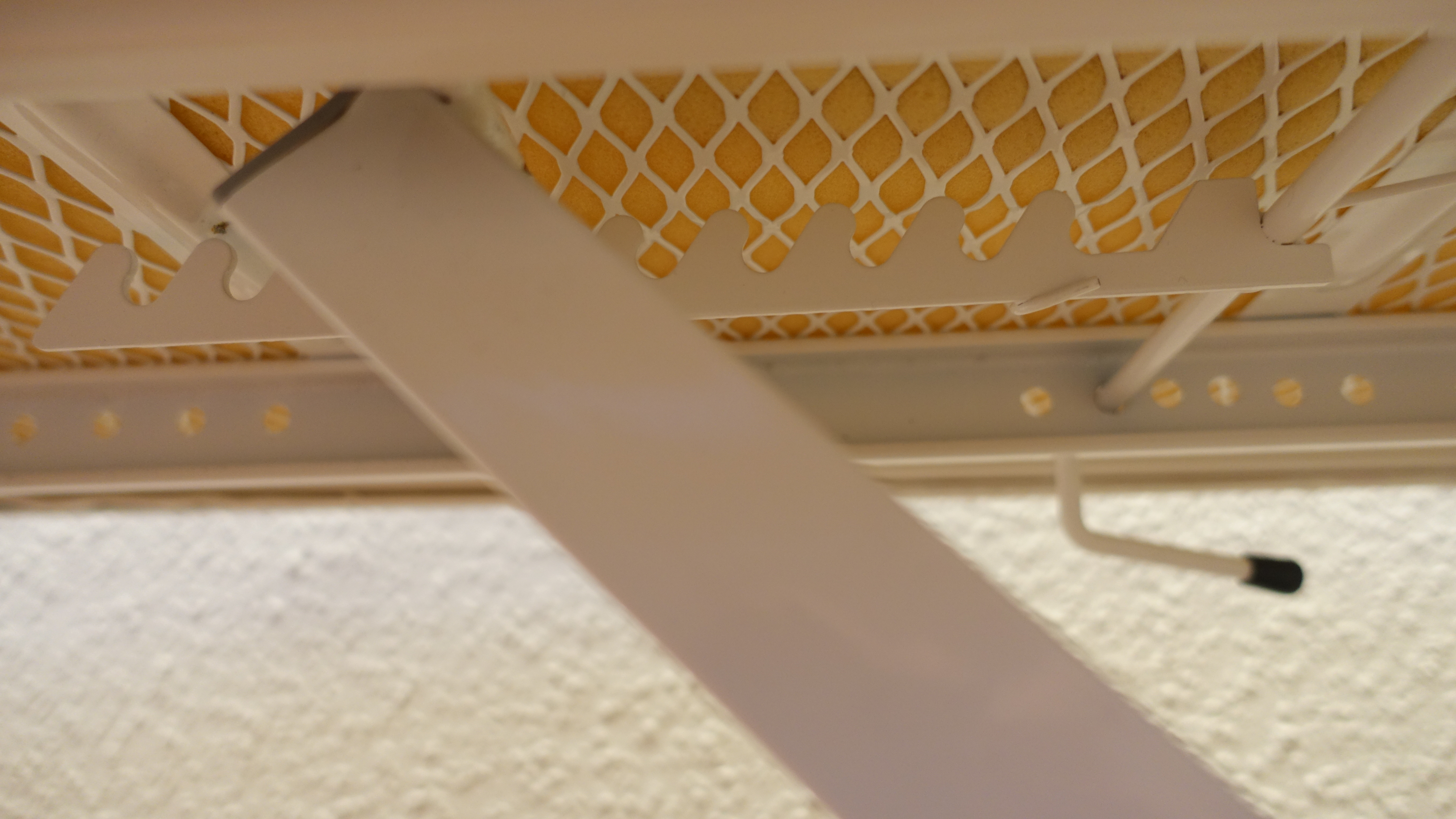 Strijkplank Leifheit in gebruik en diverse onderdelen